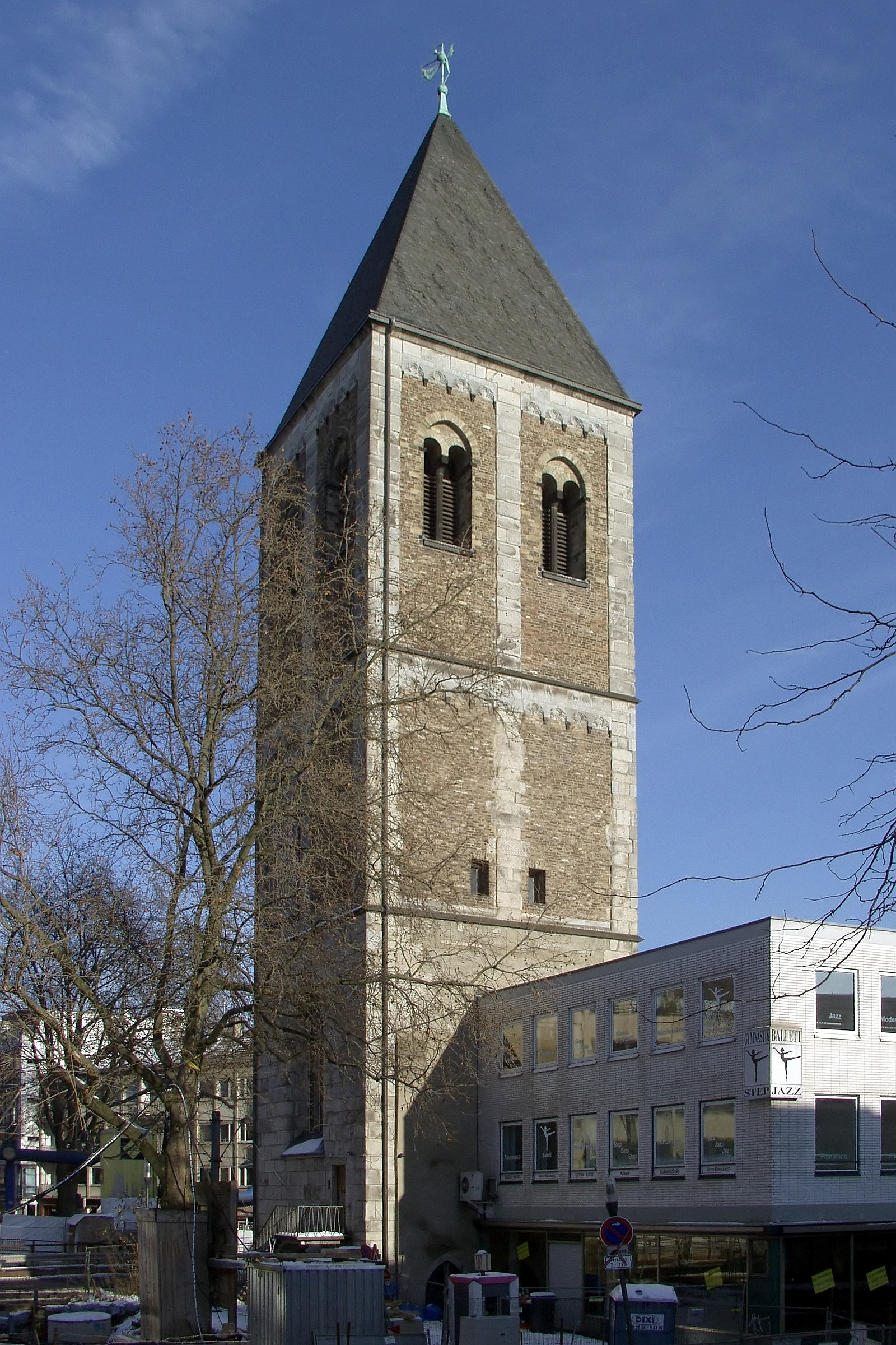 Klein St. Martin - Turm Südseite